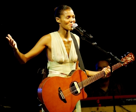 Ayo en Concert au Sporting Monte Carlo - Monaco le 30 Aout 2007